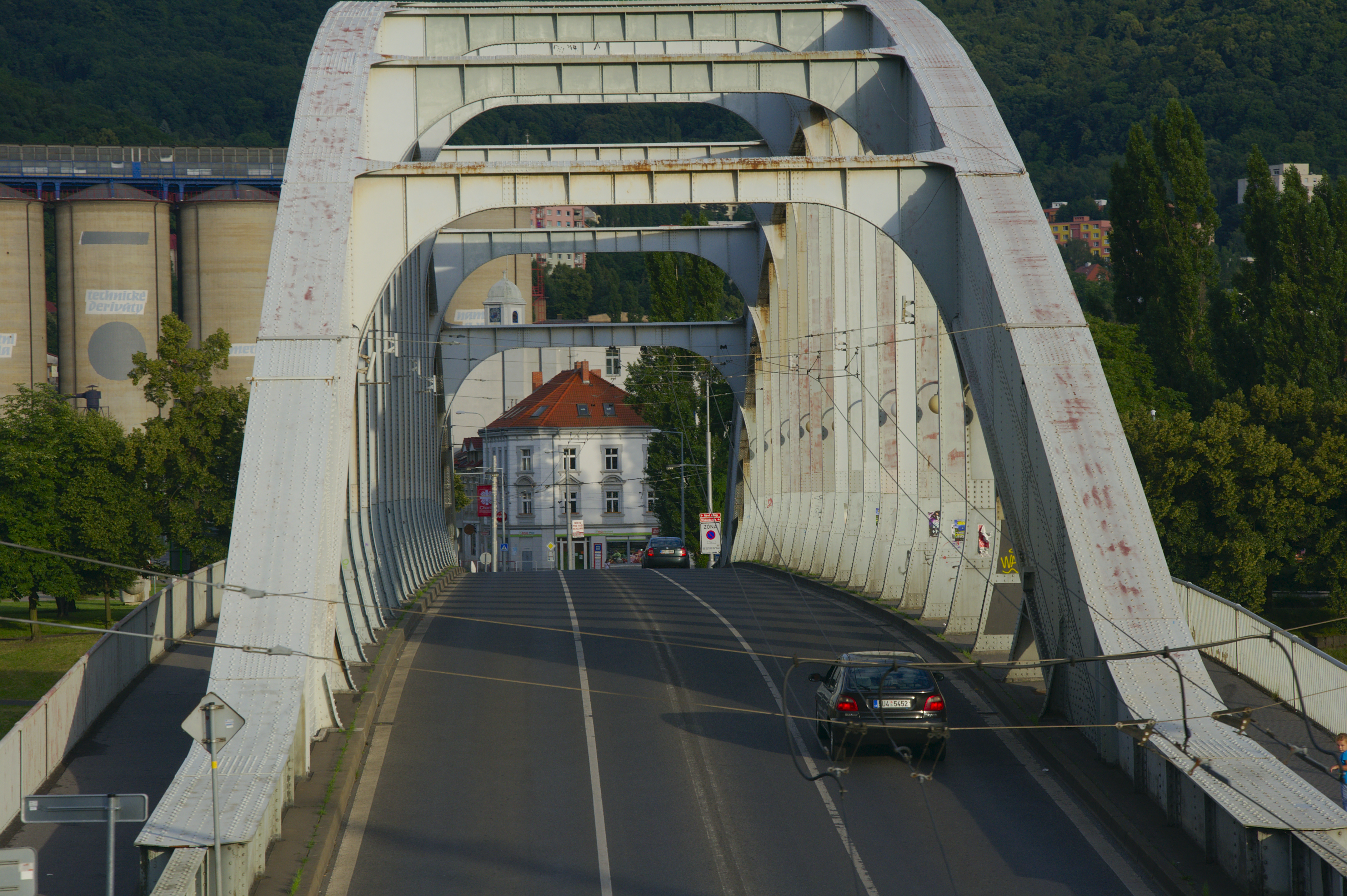 Most Dr. Edvarda Beneše, Ústí nad Labem